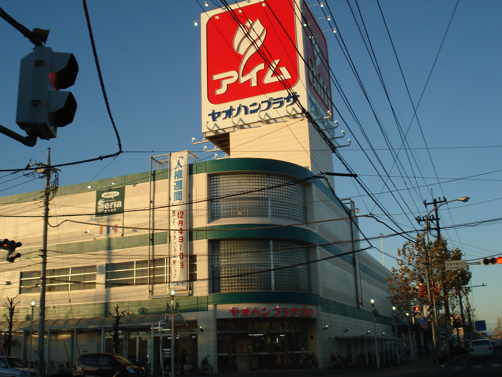 ヤオハンアイム店（栃木県栃木市昭和町）